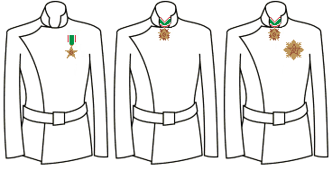 Ordine della Stella della Solidarietà Italiana - 1° decreto